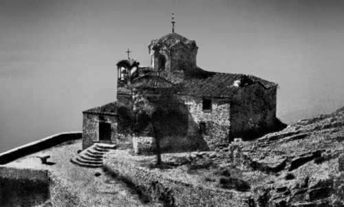 ഹെർതടാകതീരത്തുള്ള പള്ളി